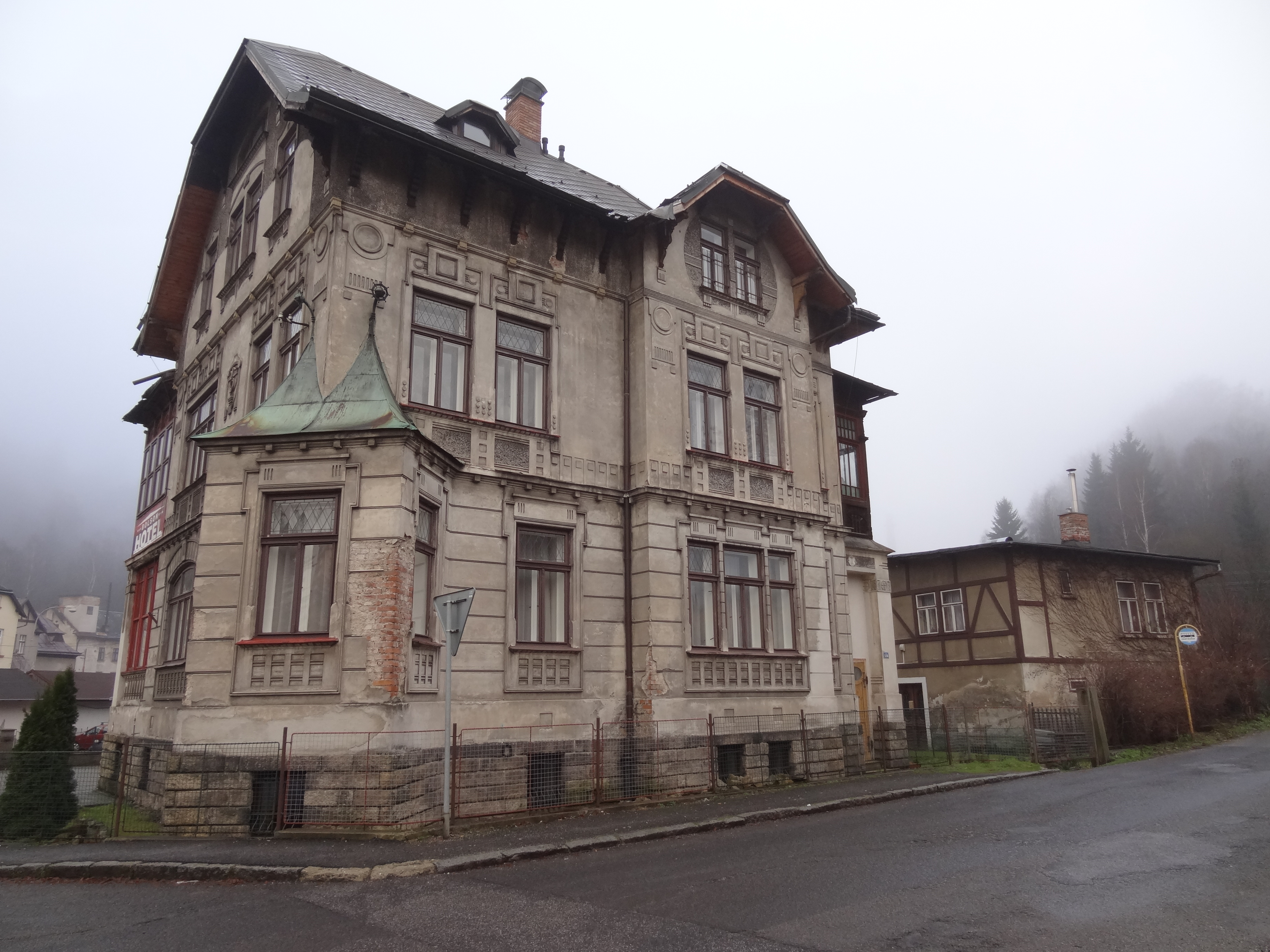 Vila Antonína Riedela, Údolní 526, Desná II, Desná.